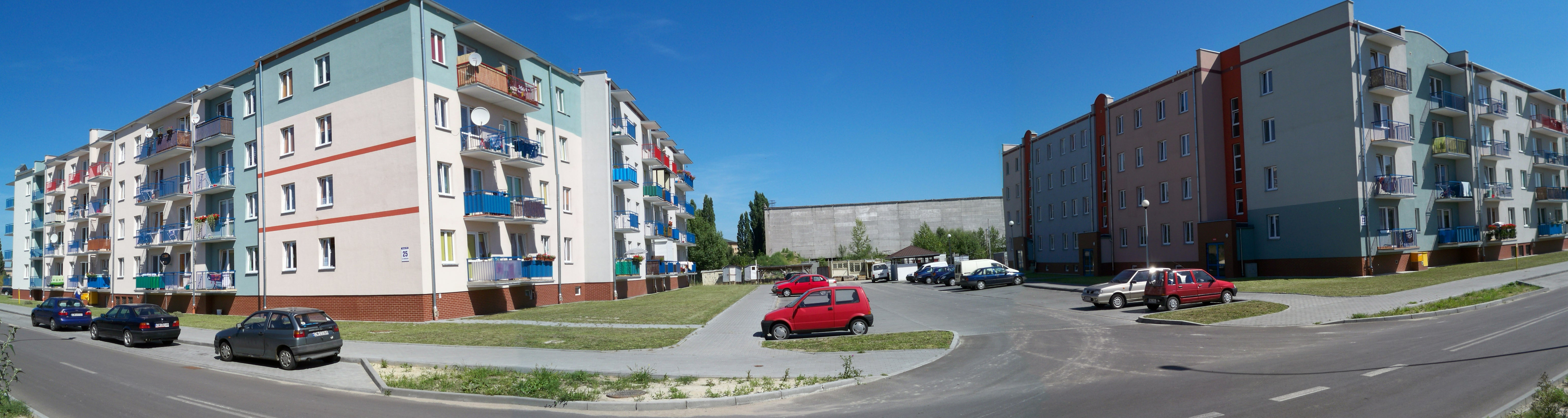 Nowe bloki przy ul. Celulozowej we Włocławku (2009 r.)